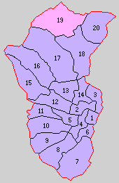 大分県直入郡の町村制時点の町村。